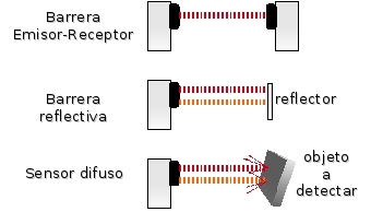 Clases de sensores fotoeléctricos